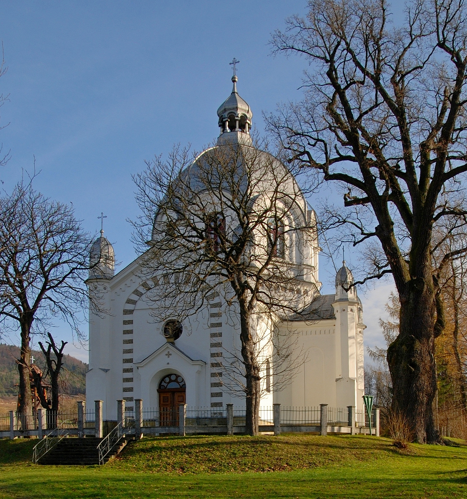 wieś Węglówka